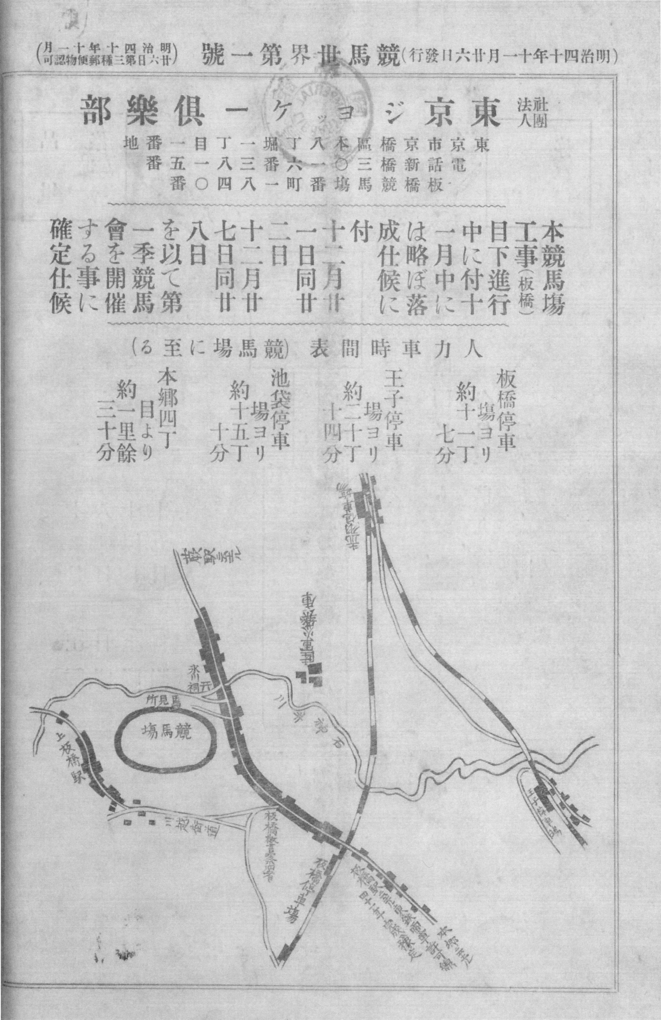 板橋競馬場 開業広告 1907年『競馬世界』誌1号巻末広告欄